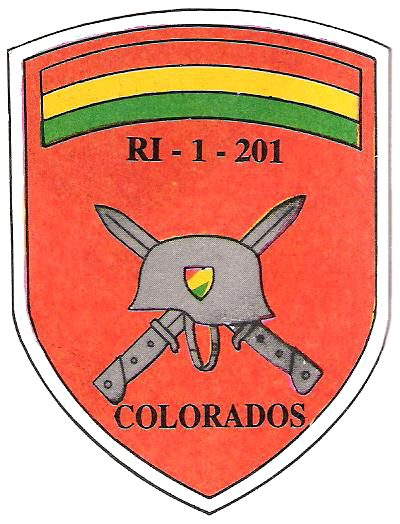 Dibujo sencillo del Emblema usado por los Colorados de Bolivia.